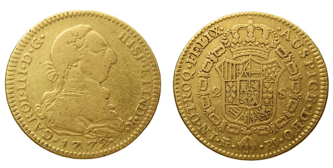 Moneda de dos escuts encunyada en 1772 al regnat de Carles III d'Espanya. És una peça d'or fabricada a Madrid.